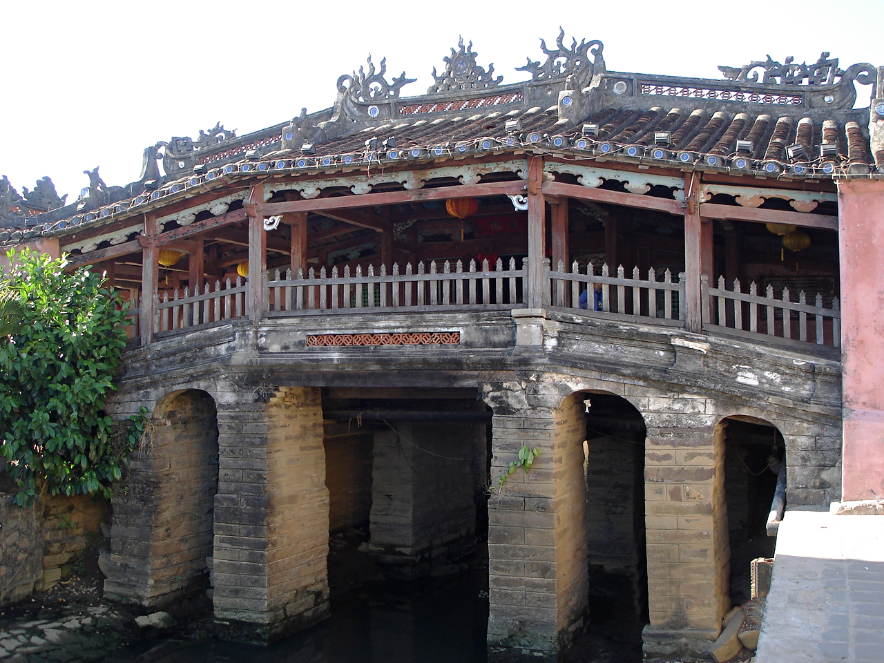 Ansicht der japanischen Brücke